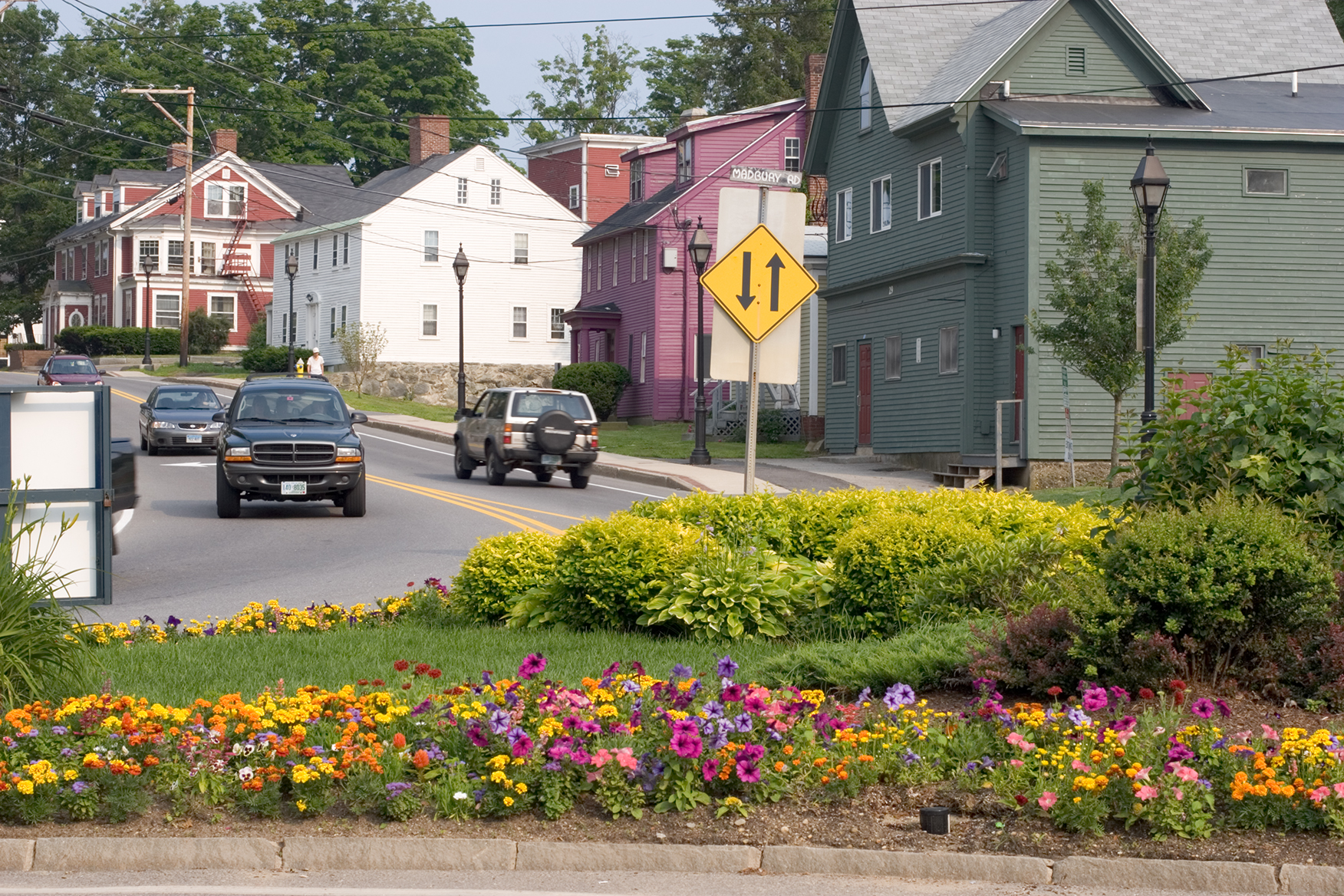 Durham, NH.